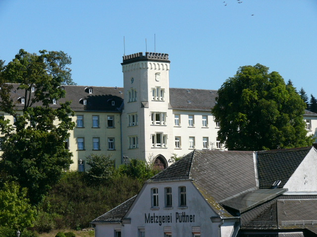 Schloss Oberkotzau